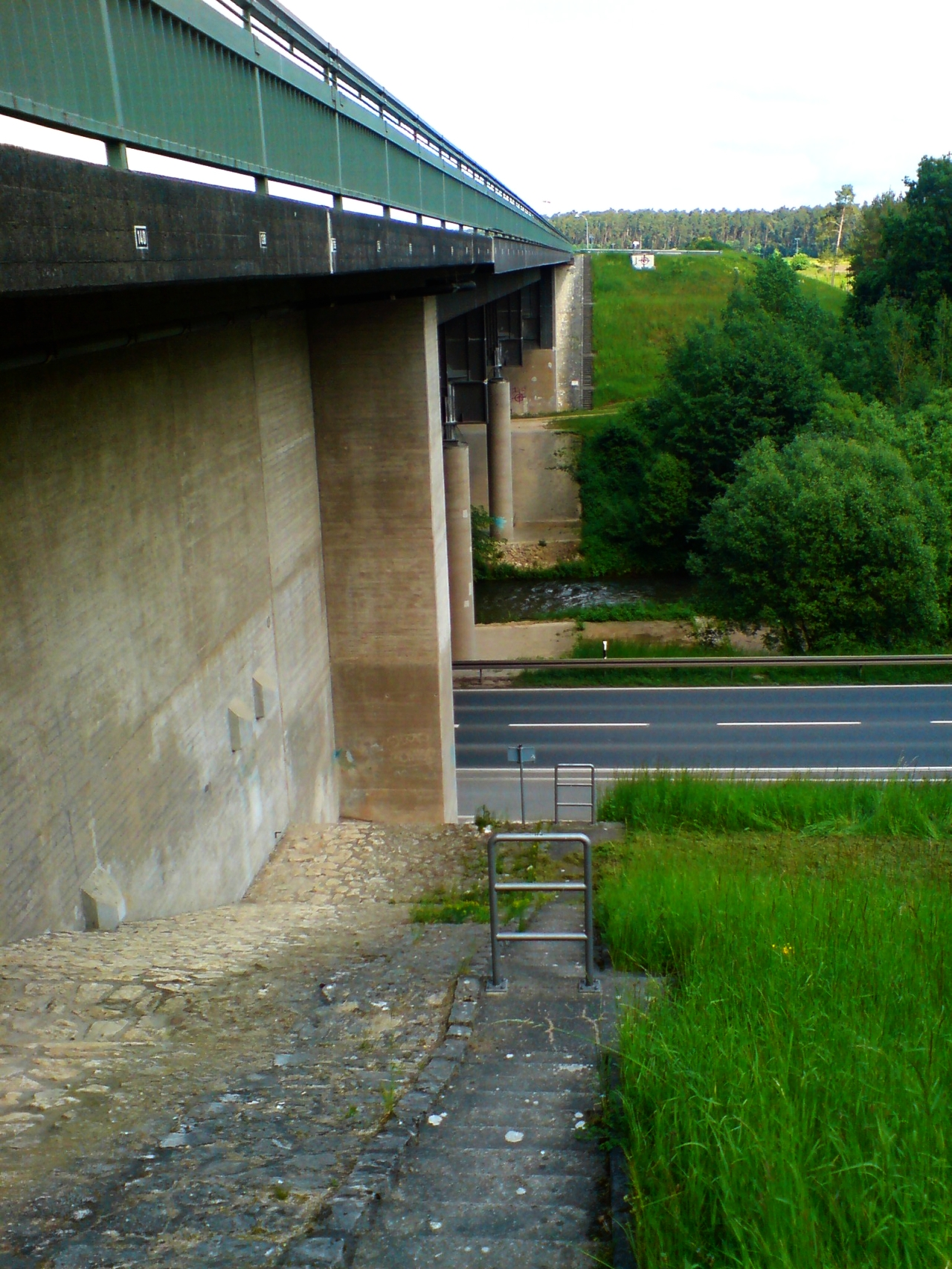 Trogbrücke bei Neuses über die Schwarzach und die Kreisstraße